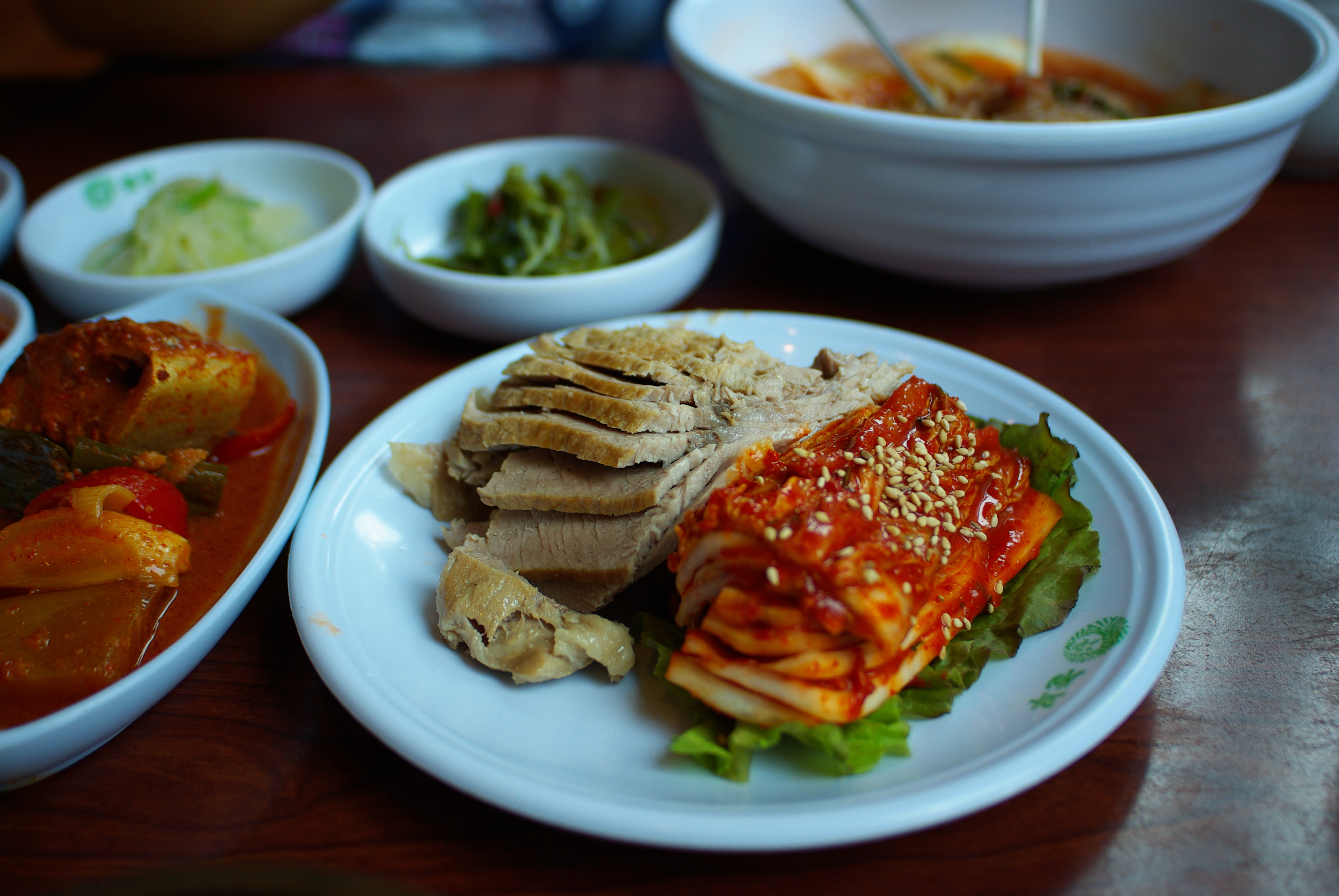 Suyuk, Korean cuisine